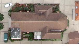 Champs-sur-Marne – Eglise Vue aérienne: "Des données librement réutilisables Les cartes et photographies sont librement réutilisables selon les « conditions générales de réutilisation des informations publiques ». Pour favoriser la création de nouveaux produits et services et contribuer au développement économique, la loi n°78-753 du 17 juillet 1978 crée un droit de réutilisation des informations publiques. Ainsi, les informations qui entrent dans le champ de cette loi peuvent être exploitées à d’autres fins que celles de la mission de service public pour les besoins de laquelle elles ont été produites, y compris commerciales"